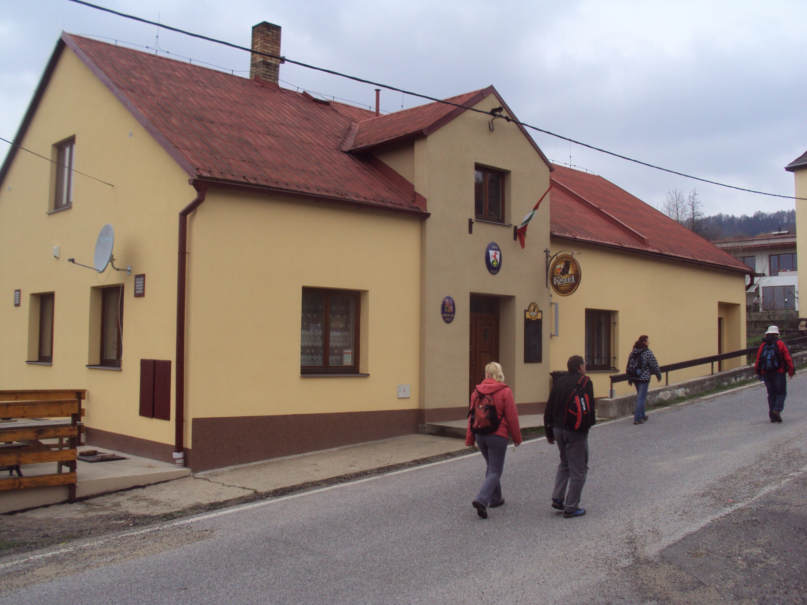 Obecní úřad a zároveň hospoda v Kozlech (nová omítka)